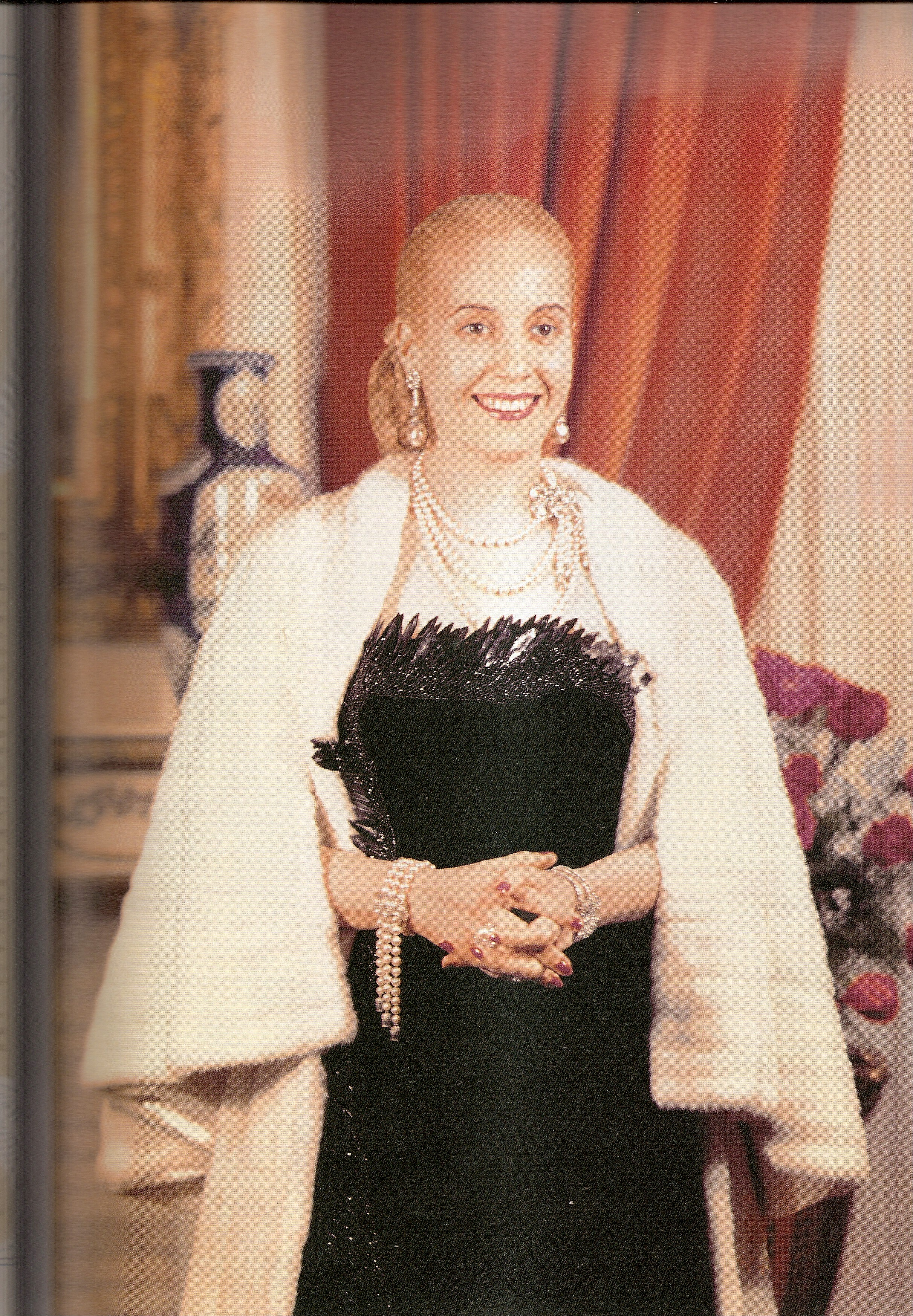 Eva Perón